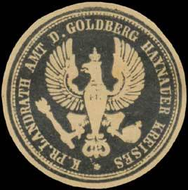 Sealing stamp Title: K.Pr. Landrath Amt des Goldberg Haynauer Kreises Description: schwarz, weiß Place: Goldberg/Schlesien size: cm